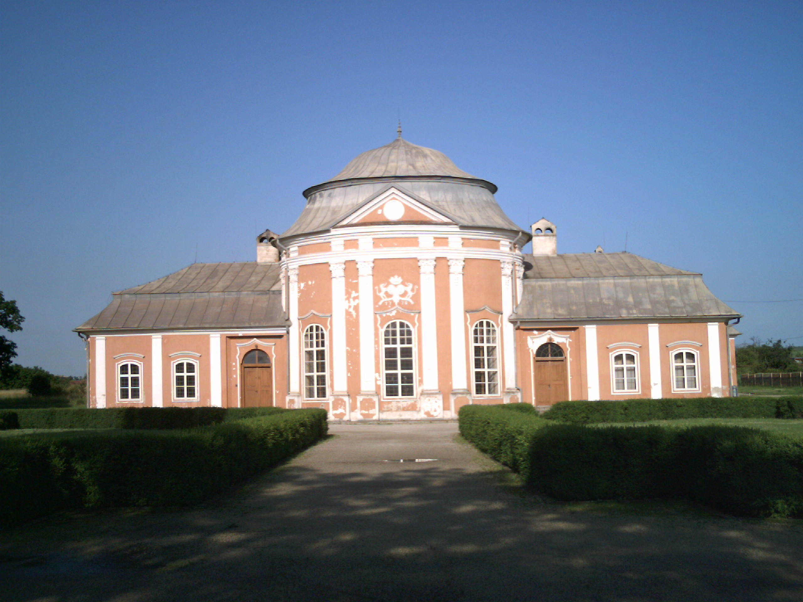 Slovakia saca rococo castle.JPG